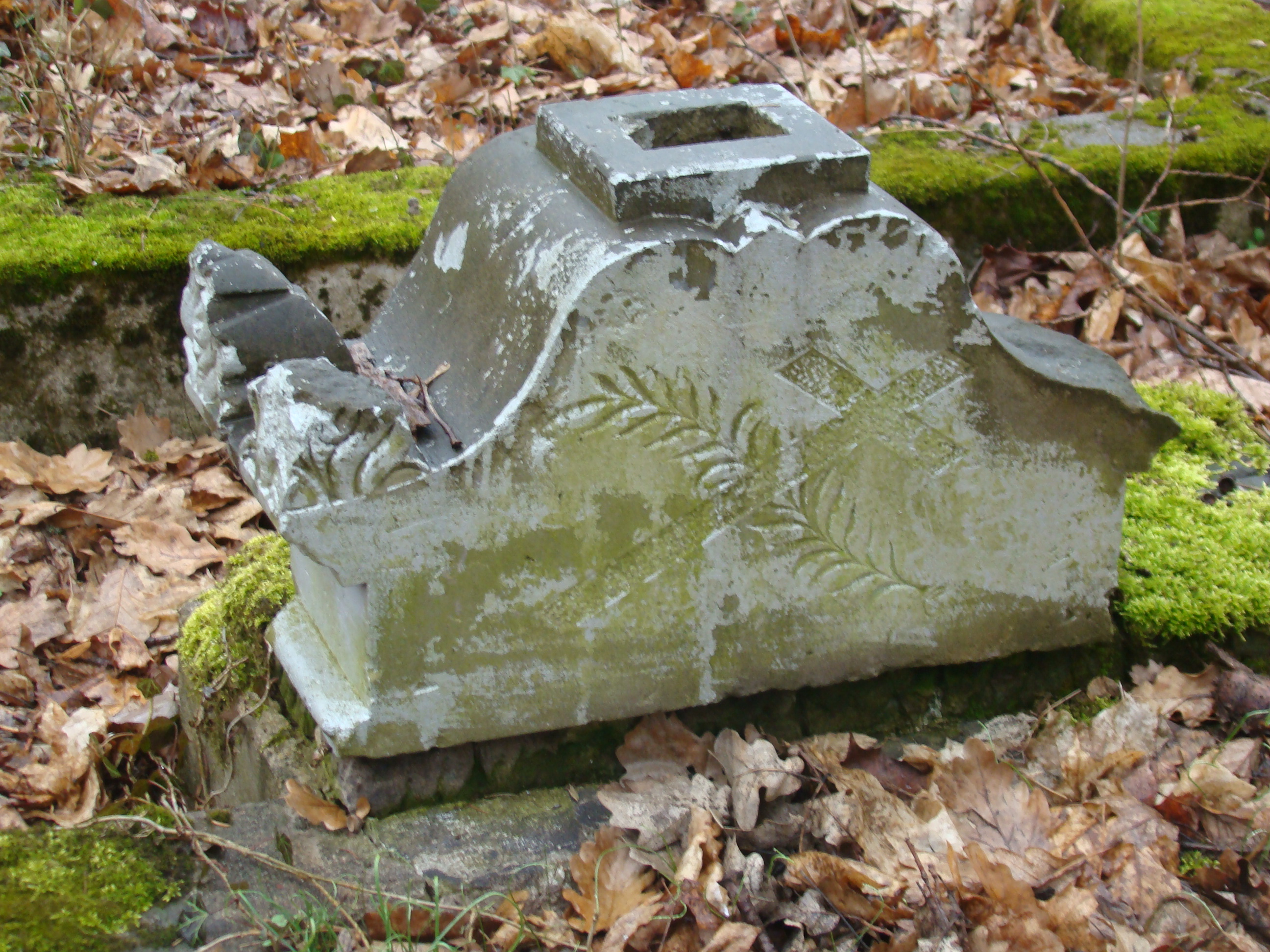 Fragment grobu na cmentarzu